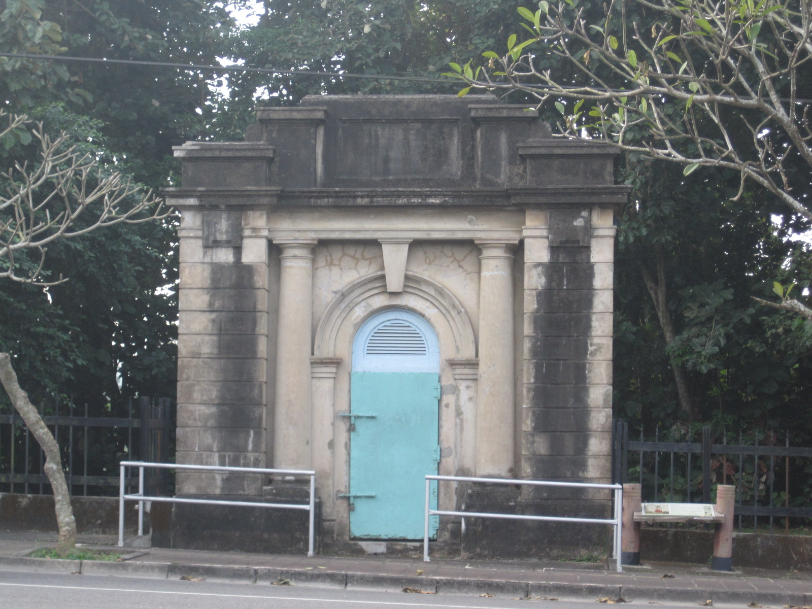 嘉義水源地水錶室